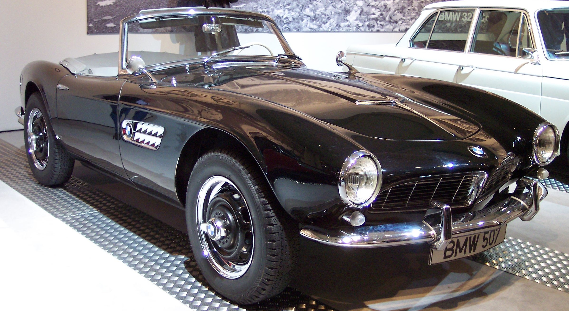 BMW 507 1958